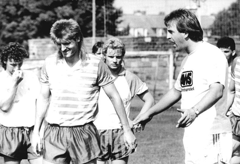 ADN-Jürgen Sindermann-9.8.90-Rostock: Fußball Mit dem Ex-Braunschweiger Uwe Reinders als Tainer geht der FC Hansa Rostock in die neue Saison. Nicht zuletzt von diesem Mann, der die Gepflogenheiten der Bundesliga kennt, erhofft sich die Mannschaft eine Verbesserung ihres 6. Listenplatzes. Frischer Wind weht auch beim täglichen Training, wo der 35jährige jeden einzelnen fordert.